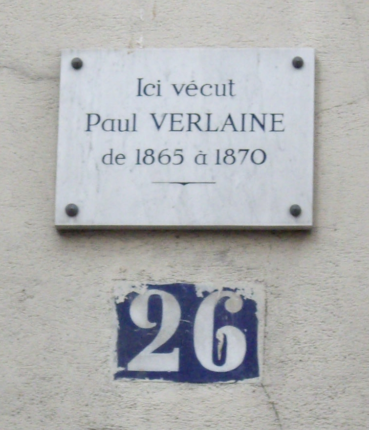 Plaque apposée au n° 26 de la rue Lécluse, Paris 17e, où Paul Verlaine vécut de 1865 à 1870.